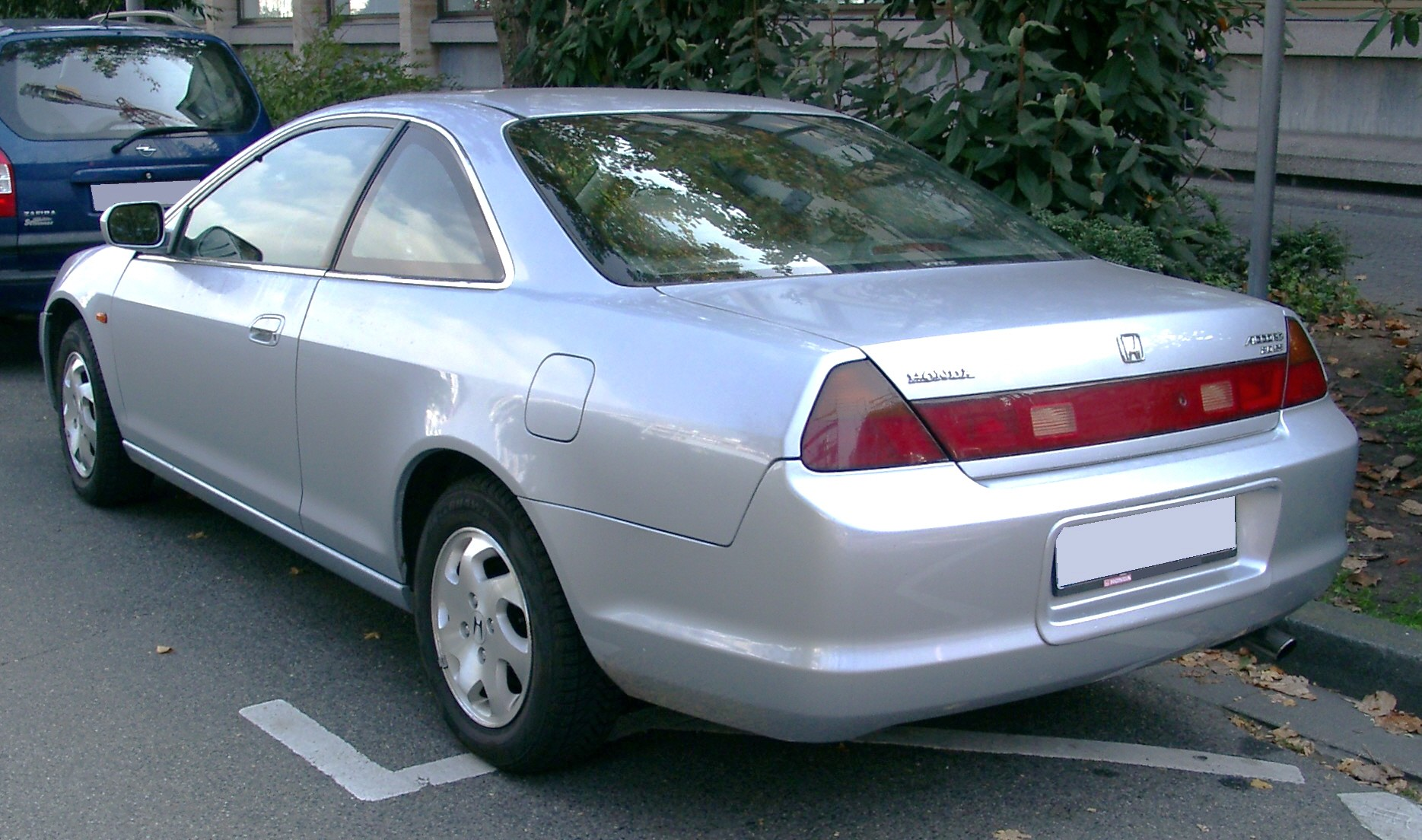 Honda Accord Coupé, 6. Generation